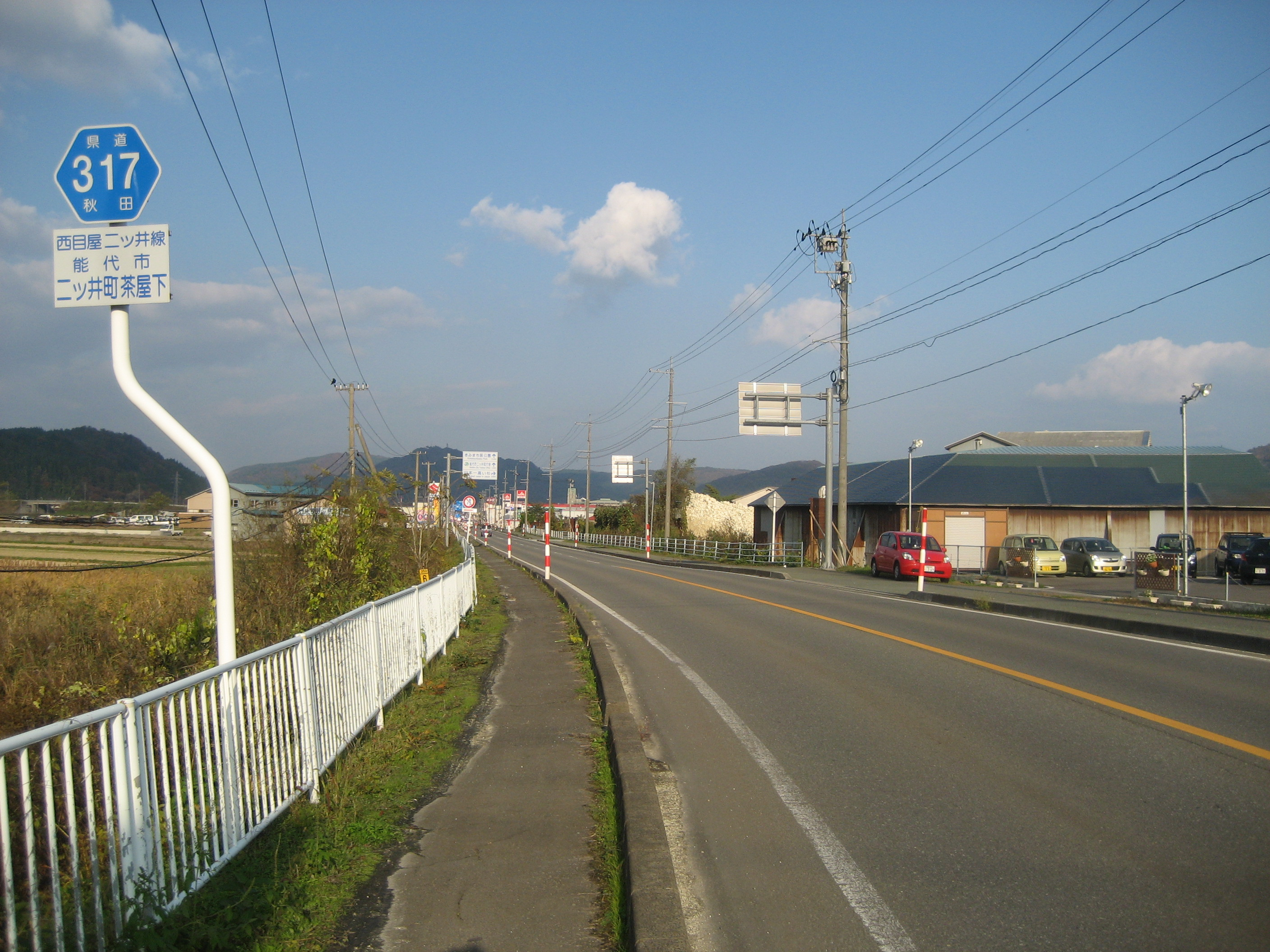 秋田県道317号線能代市二ツ井町茶屋下付近